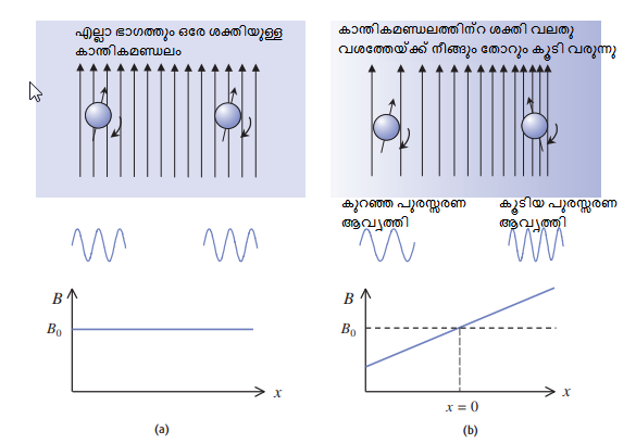 എം.ആർ.ഐ സ്കാനറിലെ ഗ്രേഡിയന്റ്. ഇടതുവശത്തെ ചിത്രത്തിൽ ഗ്രേഡിയന്റ് ഇല്ലാത്ത സ്ഥിരകാന്തികമണ്ഡലം. ഒരു ഗ്രേഡിയന്റ് കൊണ്ടുവരുന്നതിലൂടെ കാന്തികമണ്ഡലത്തിന്റെ ശക്തി ഒരു വശത്തു നിന്നും മറ്റേ വശത്തേയ്ക്ക് ക്രമമായി വർദ്ധിയ്ക്കുന്നു. ഇത് മൂലം പ്രോട്ടോണുകളുടെ പുരസ്സരണ ആവൃത്തിയും വർദ്ധിയ്ക്കുന്നു. ഇതിന്റെ ഫലമായി ഓരോ സ്ഥാനത്തുമുള്ള പ്രോട്ടോണുകളെ അവയുടെ പുരസ്സരണ ആവൃത്തി നോക്കി തരംതിരിയ്ക്കാം.